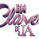 En Clave de Ja